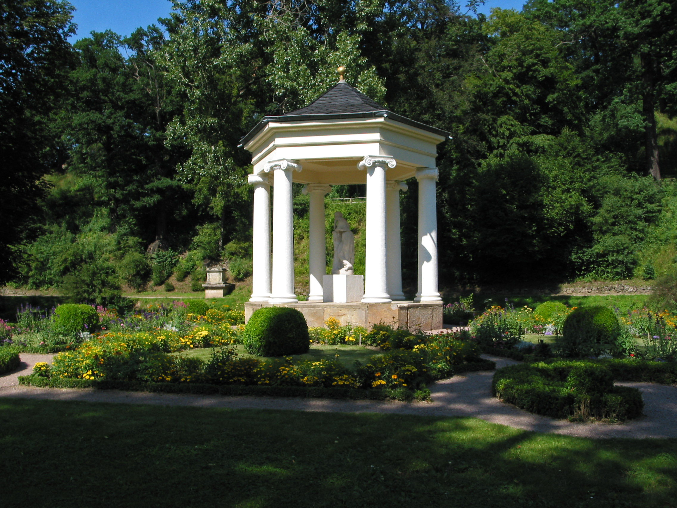 1803 im 21 ha großen Schloßpark Tiefurt errichteter Musentempel mit einer Kalliope-Skulptur im Zentrum und aufwendiger Schmuckbepflanzung außenrum.